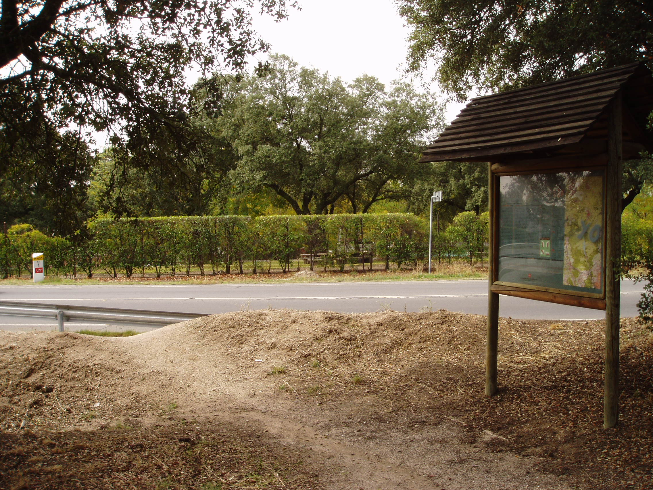 GR-124. Senda Real. Carretera de El Pardo. Madrid. España